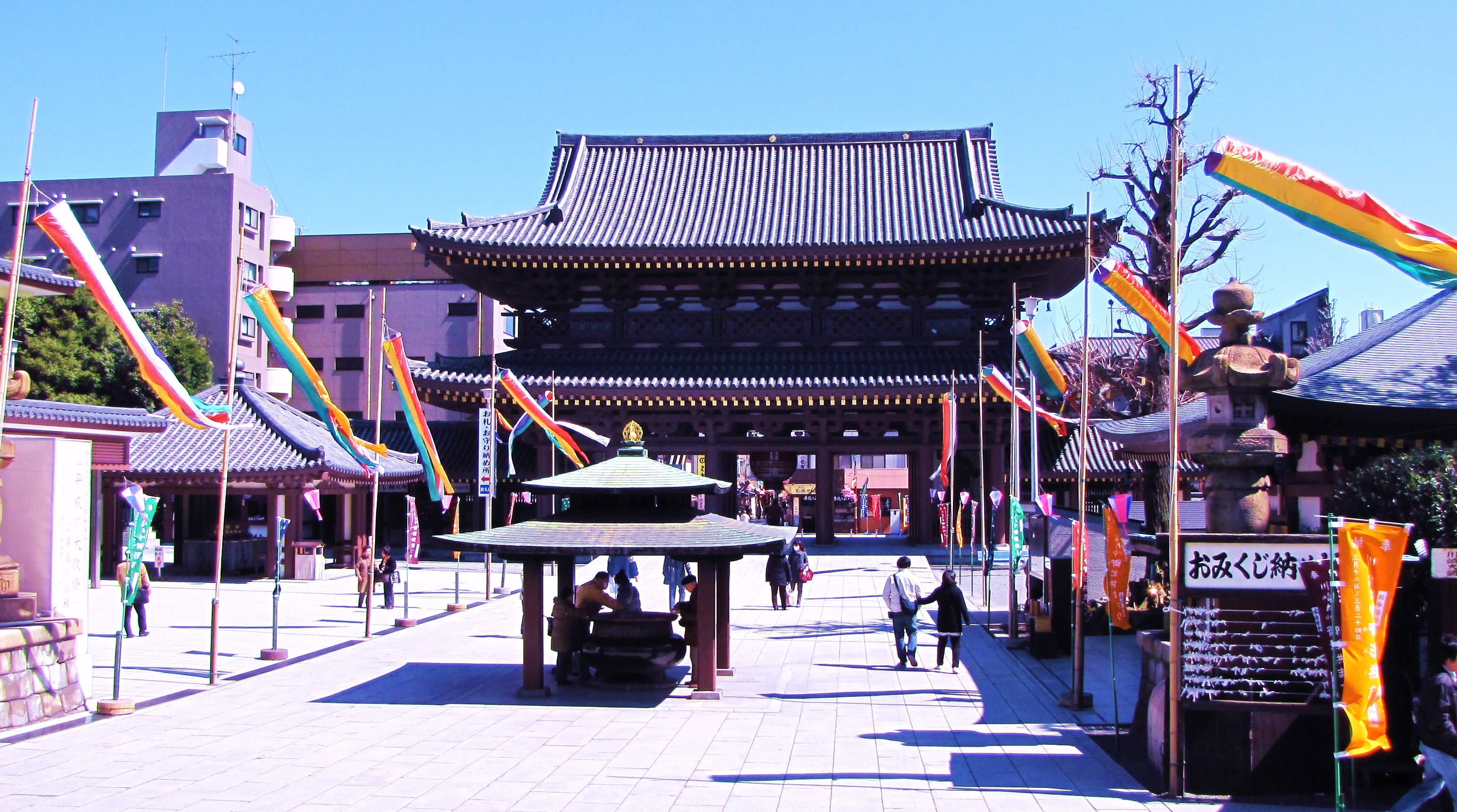 Kawasakidaishi 川崎大師